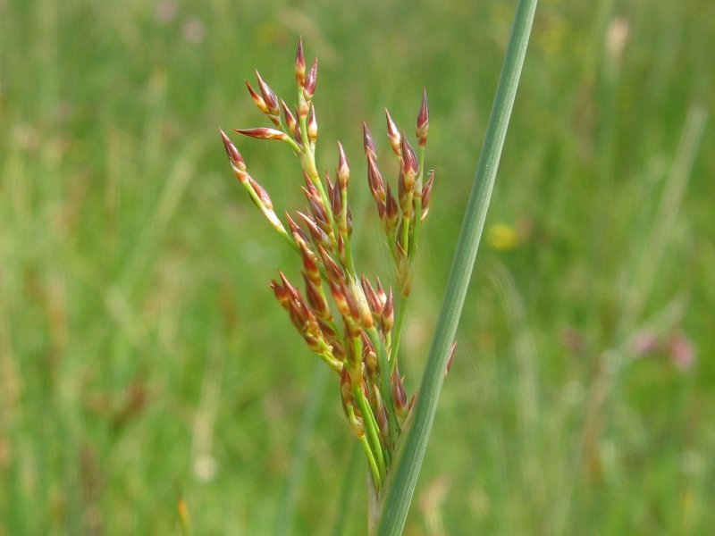 Spirre der Blaugrünen Binse Juncus inflexus, Gragetopshof bei Rostock